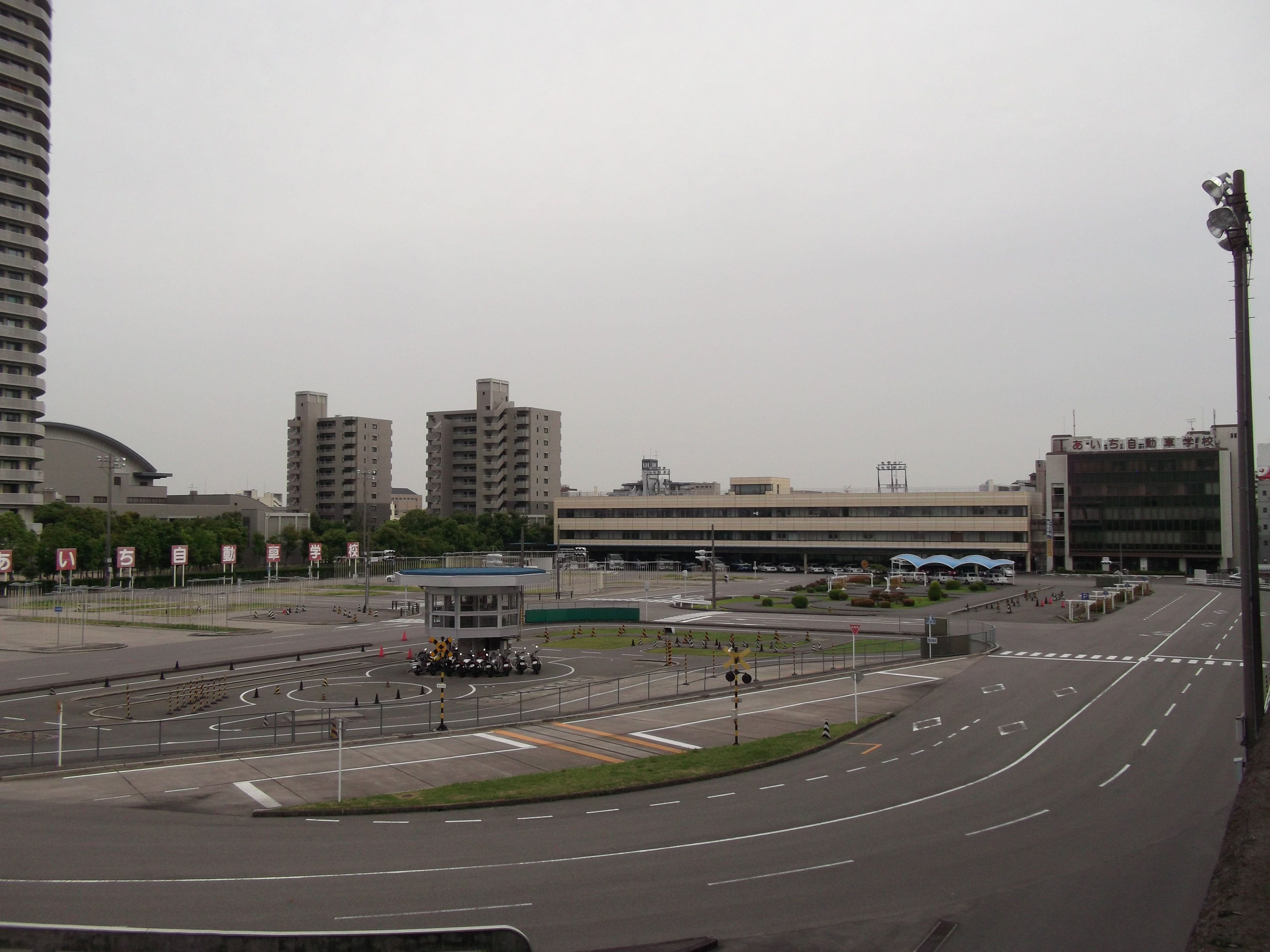 名古屋市北区成願寺に所在するあいち自動車学校の全景(国道41号から写す)